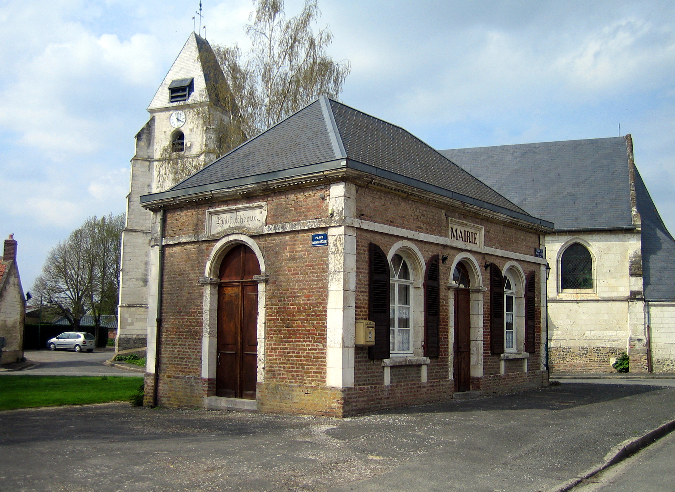 Quesnoy-sur-Airaines (Somme, France) - La mairie et l'église. On remarque la gravure élégante du mot "Bibliothèque" dans la pierre au-dessus d'une des portes de la petite mairie. .